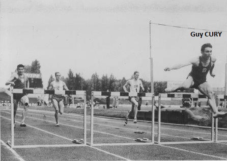 Guy Cury